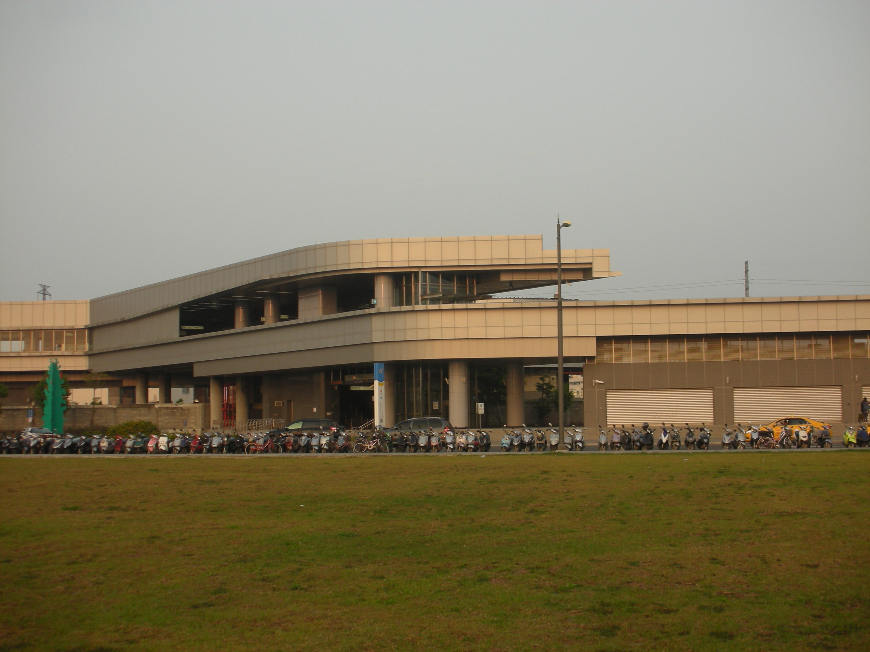 高雄捷運 大寮站